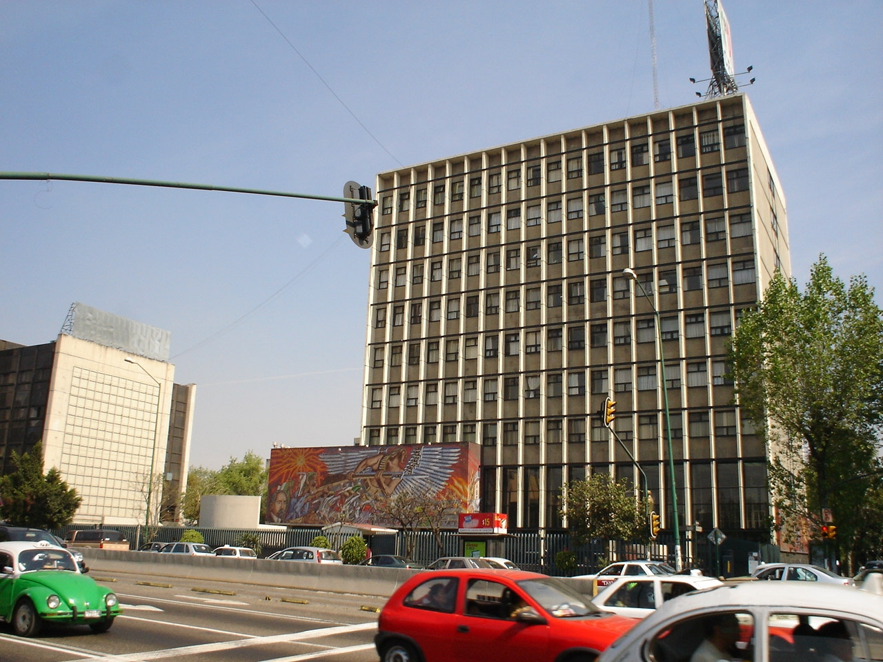 OFICINAS CENTRALES DEL PARTIDO REVOLUCIONARIO INSTITUCIONAL